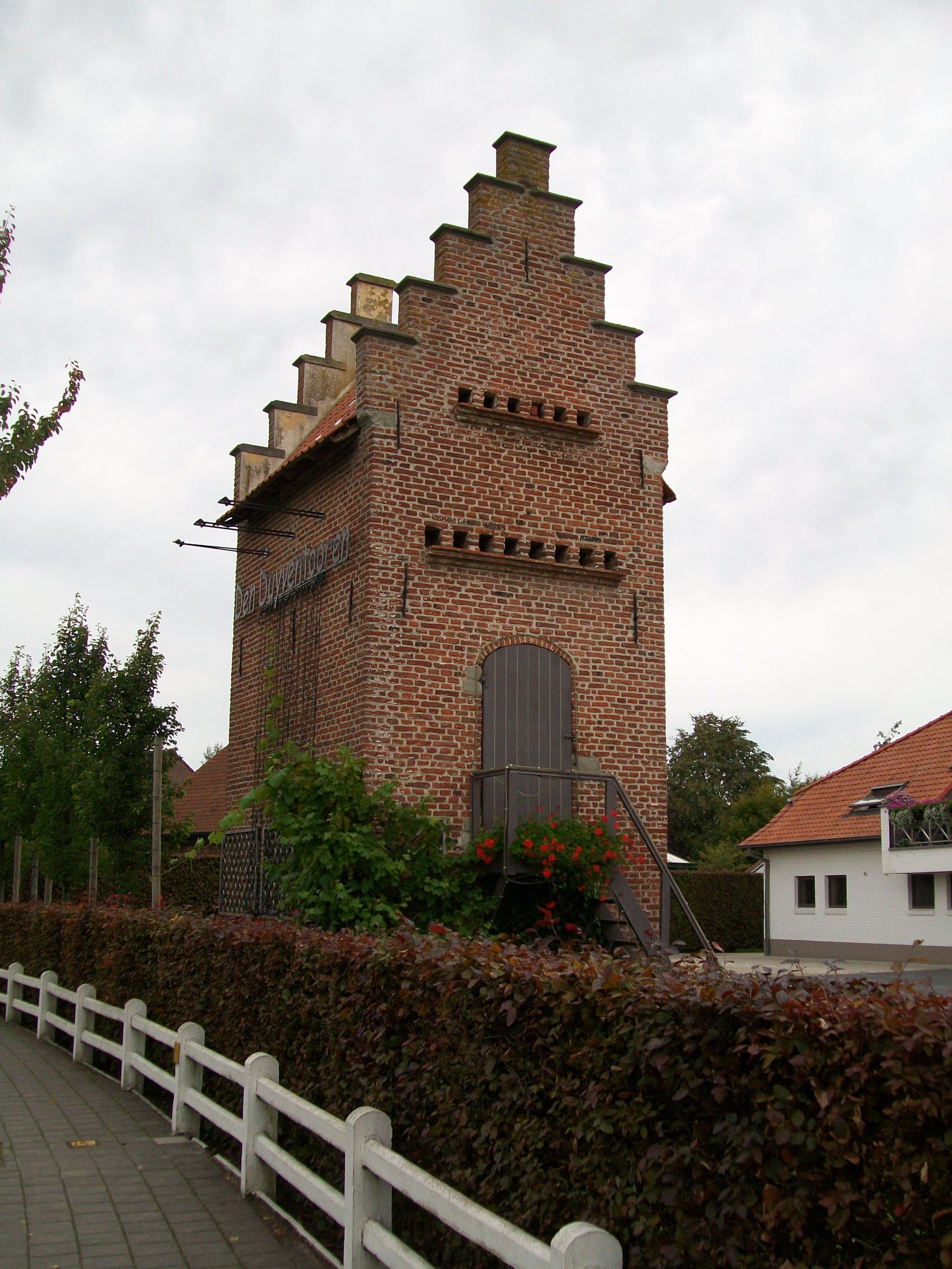 Onroerend erfgoed in Aalter: duiventoren (Bellem)